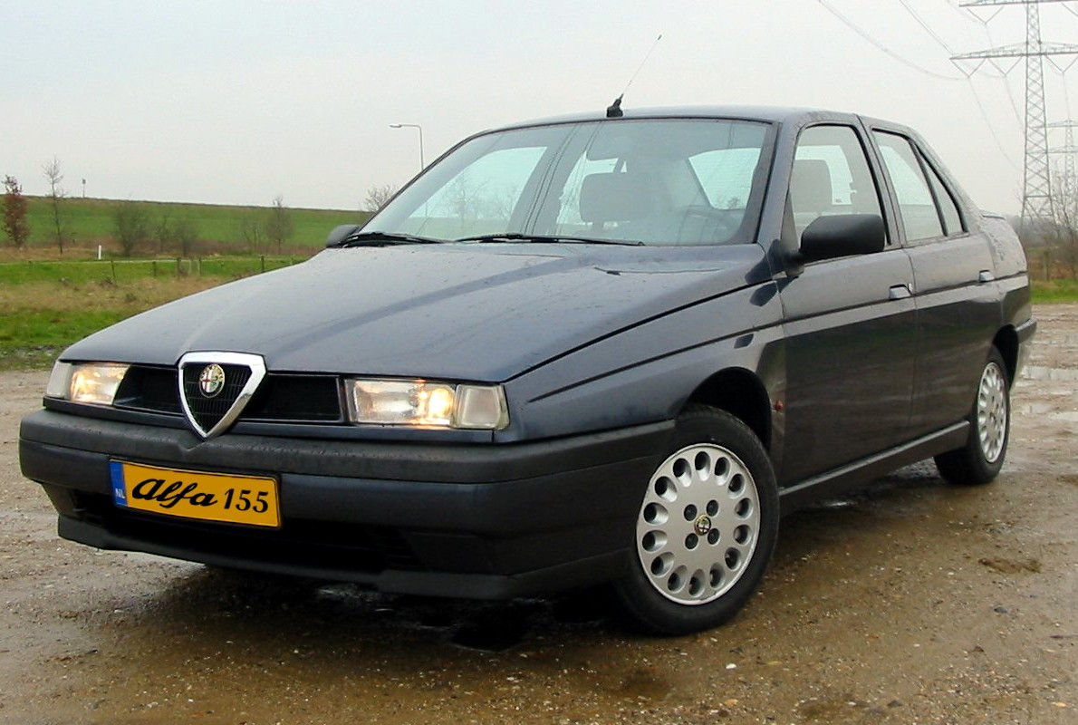 Alfa Romeo 155 Widebody